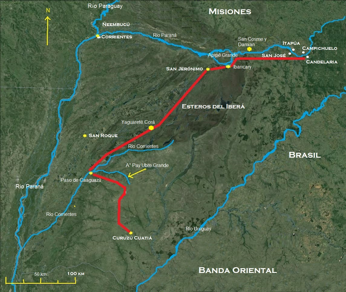 Marcha de aproximación ejercito junta de Buenos Aires